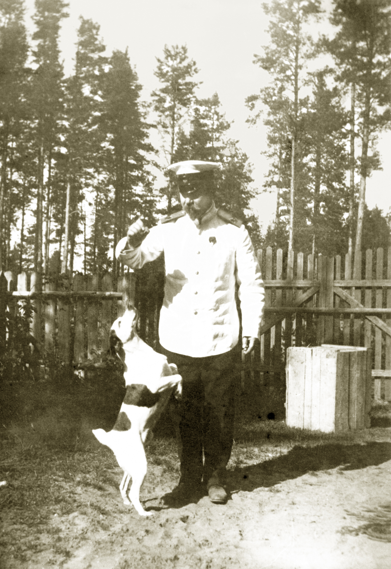 Контр-адмирал Максимилиан Федорович фон Шульц в Луге 1913 г.